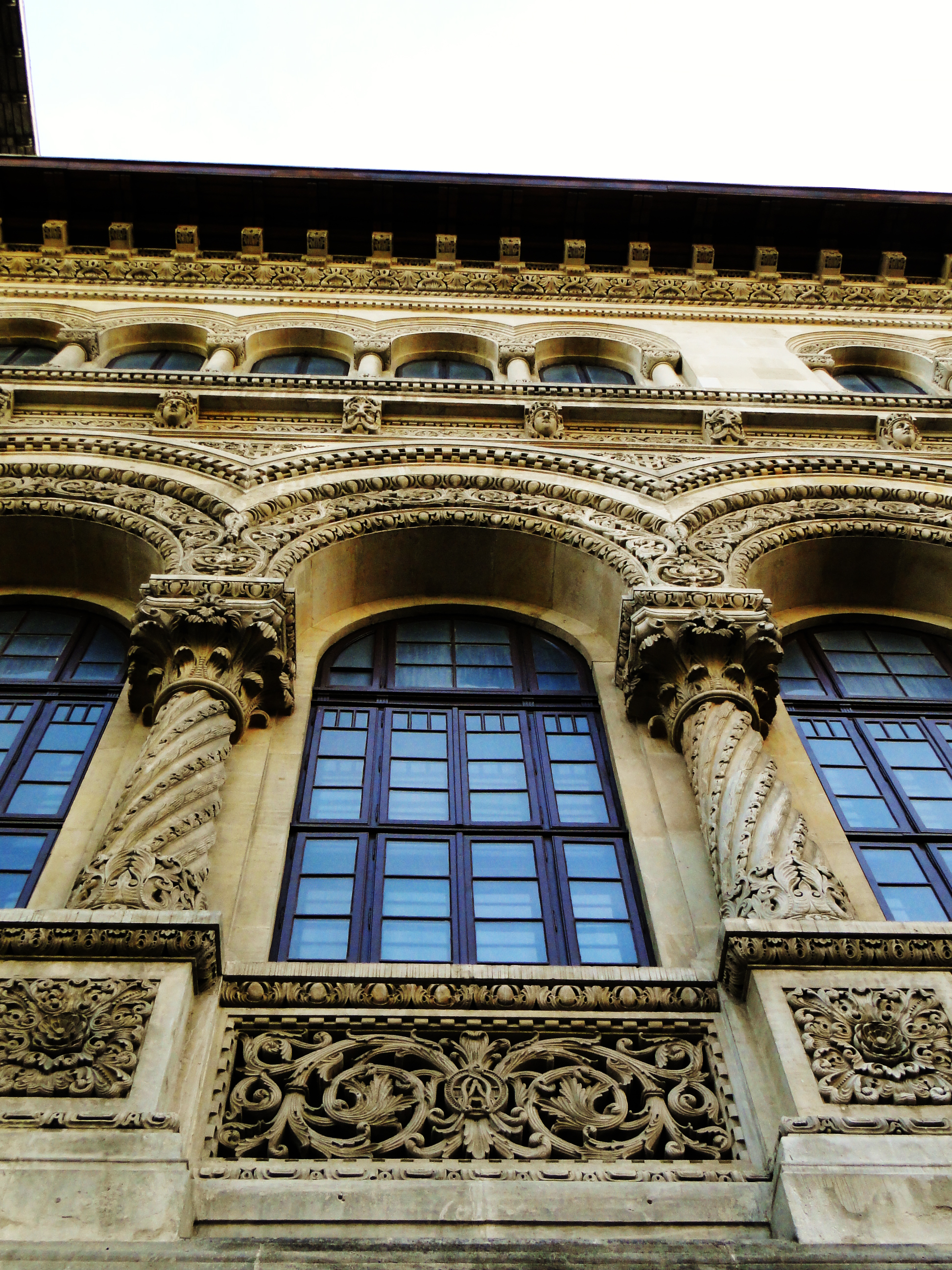 Universitatea de Arhitectură și Urbanism "Ion Mincu" - corpul vechi